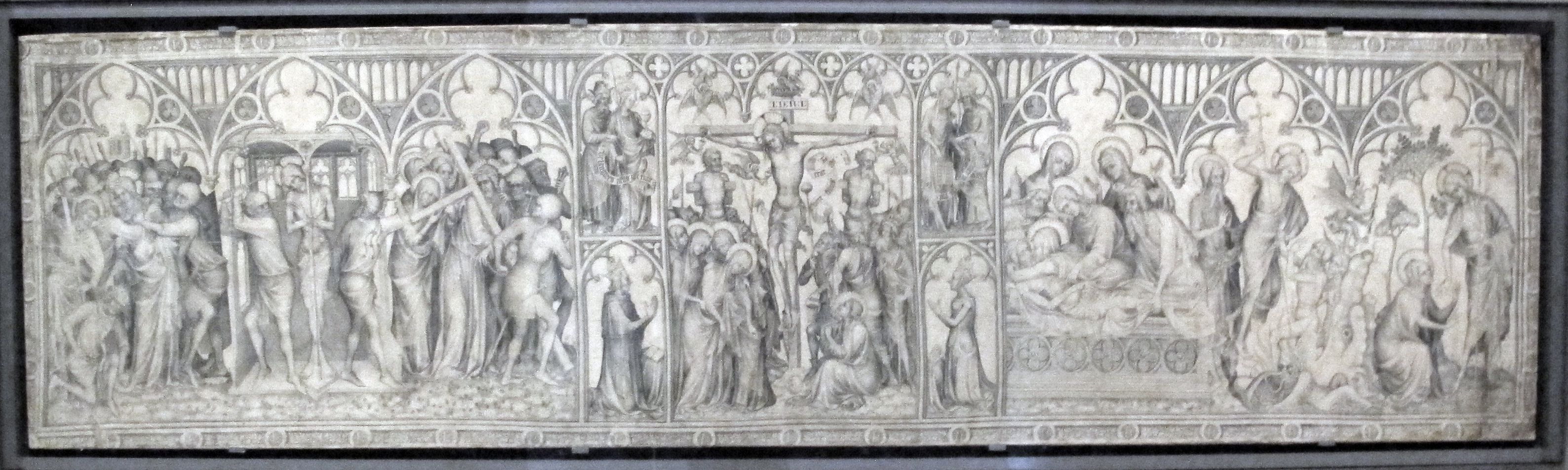 Dipinti francesi nel Louvre, Parigi, secc. XIV-XV